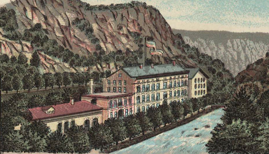 Hotel Waldkater bei Thale, Ausschnitt aus einer 1897 gelaufenen Ansichtskarte